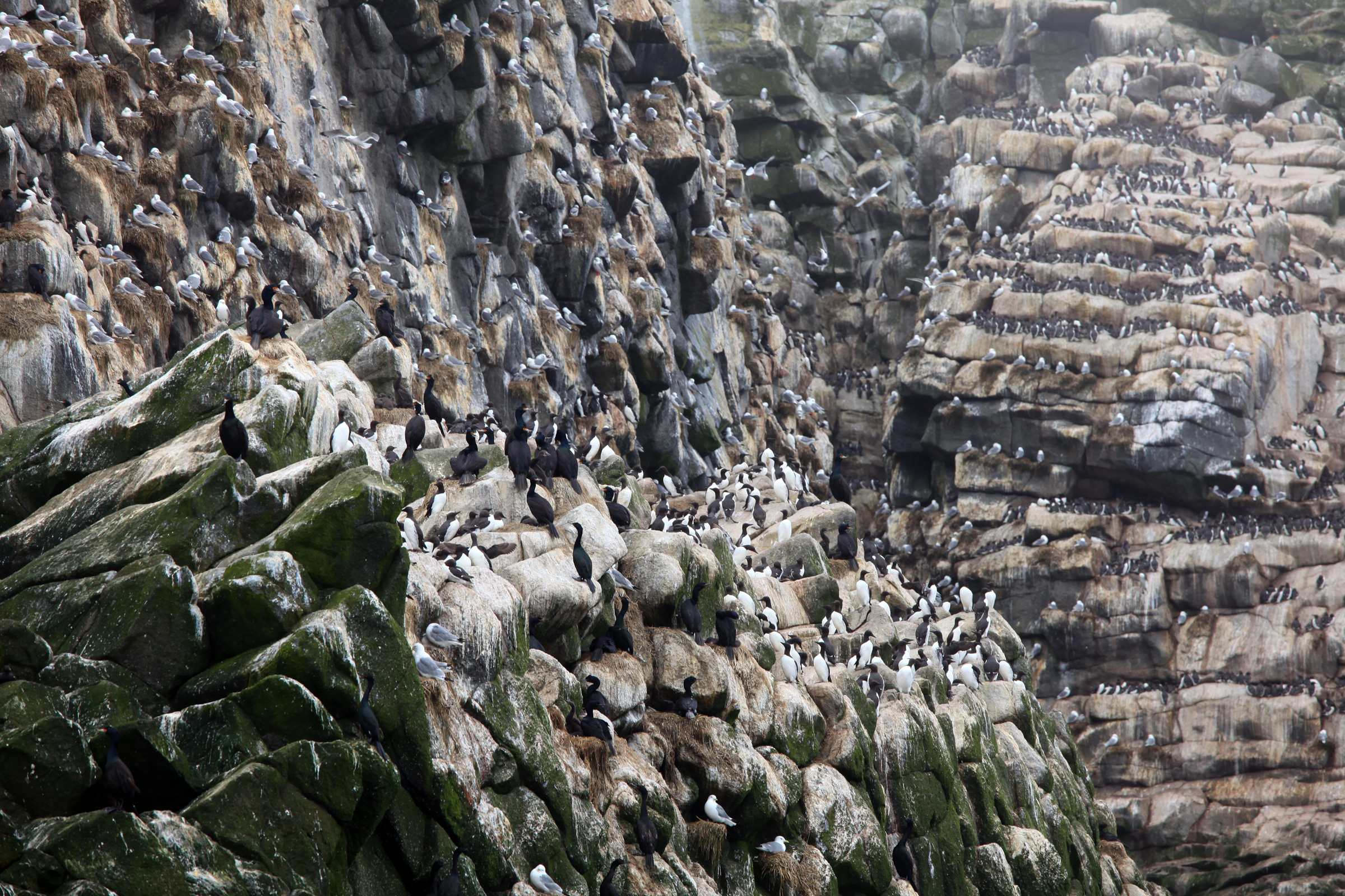 Остров Арий Камень: Алеутский район, Камчатский край This image is related to the protected area of Russia number 4110008